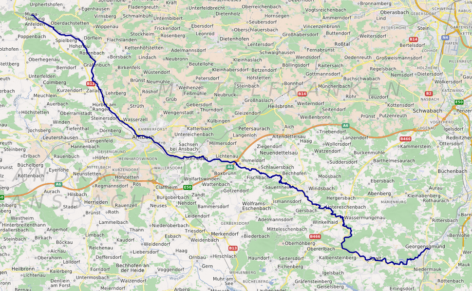 carte réalisée sur umap This map may be incomplete, and may contain errors. Don't rely solely on it for navigation.